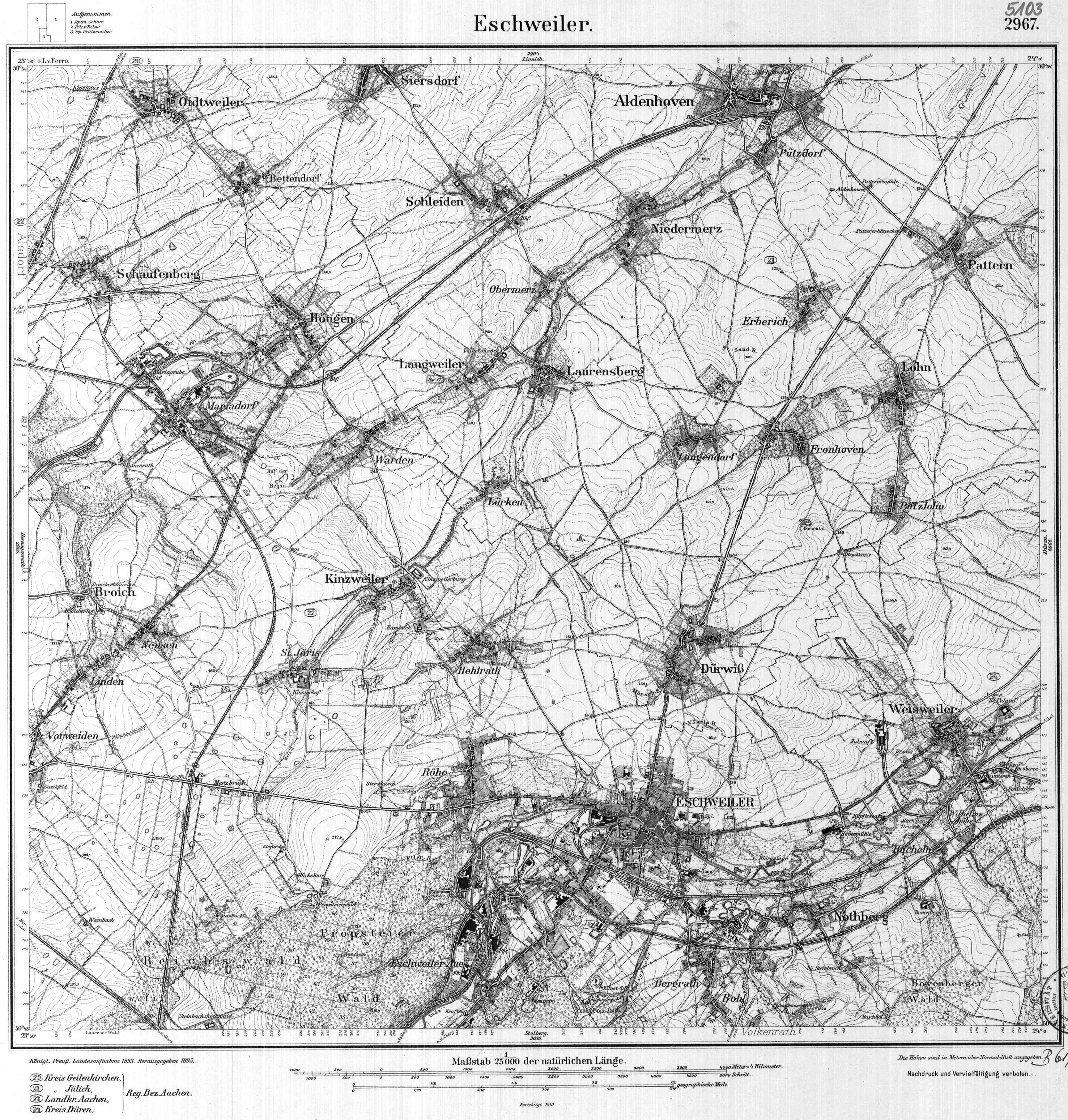 Königl.Preuß.Landesaufnahme 1893, Eschweiler Rhld.